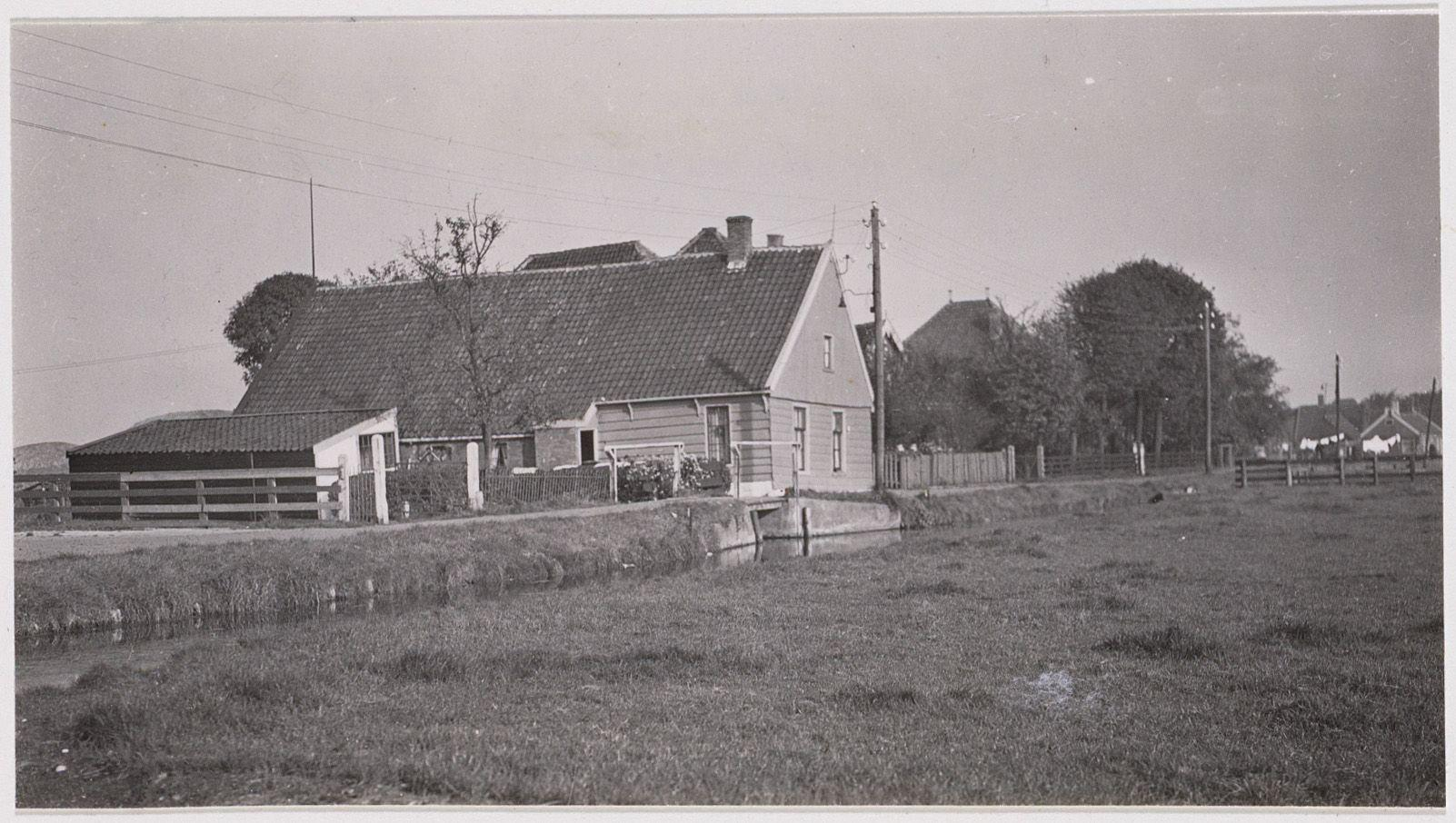 Beschrijving Zunderdorp 'T Nopeind in noordelijke richting gezien Documenttype foto Vervaardiger Eck, J. van (Jacobus, 1873-1946) Collectie Collectie J. van Eck: foto's Datering 12 oktober 1937 Geografische naam 't Nopeind (Zunderdorp) Zunderdorp Inventarissen Afbeeldingsbestand A01634000284 Generated with Dememorixer